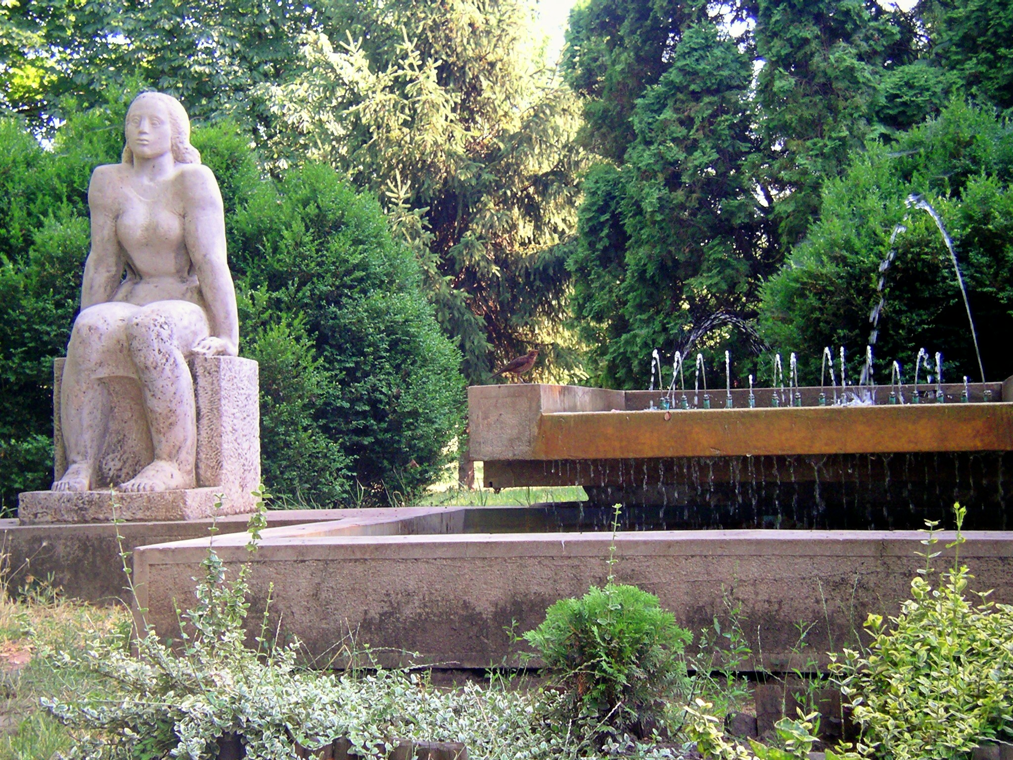 Váró. A nagyszénási Szociális Otthon szépen gondozott parkjában kialakított vízmedence mellett látható Kampfl József szobrászművész Ülő nő című mészkő szobra